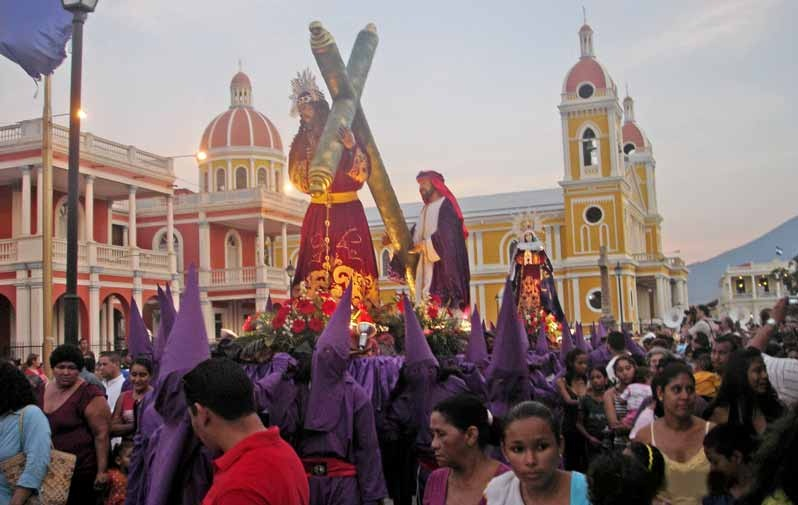 Celebración de la Semana Santa en la Ciudad de Granada en Nicaragua.